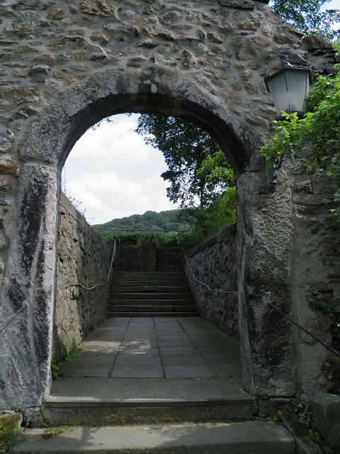 Burgruine Bergkirche Tharandt Haupteingang